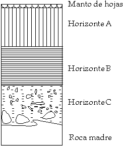 Esquema de los horizontes del suelo.